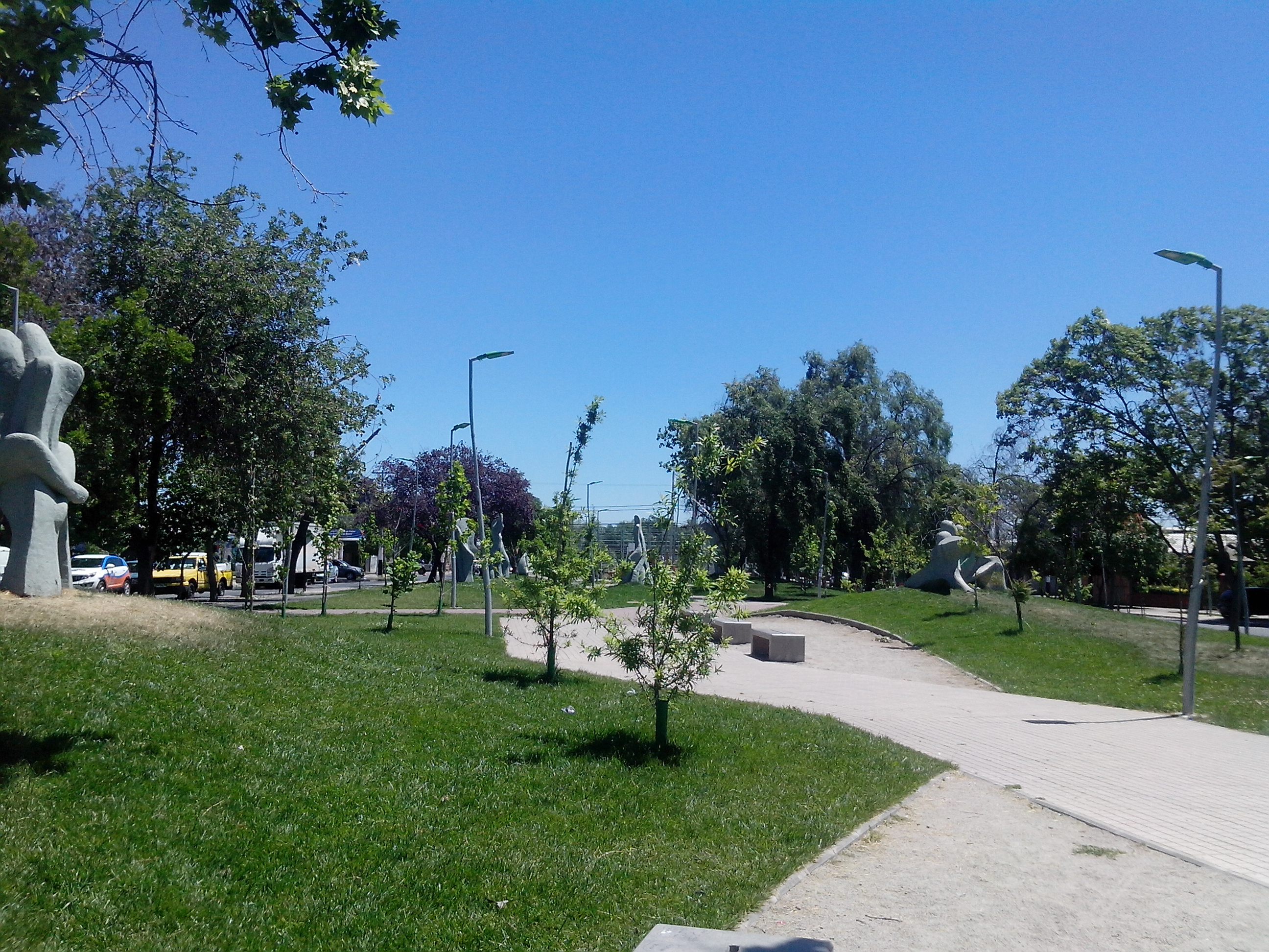 Parque Combarbalá de la comuna de La Granja, en Santiago, Chile. Parque construido en la década de los 80 y remodelado el año 2016.